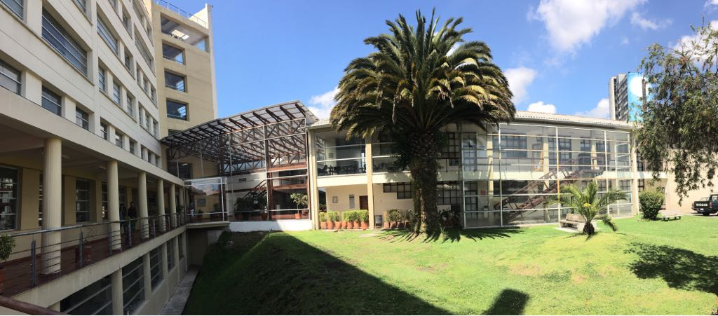 Facultad de ingeniería